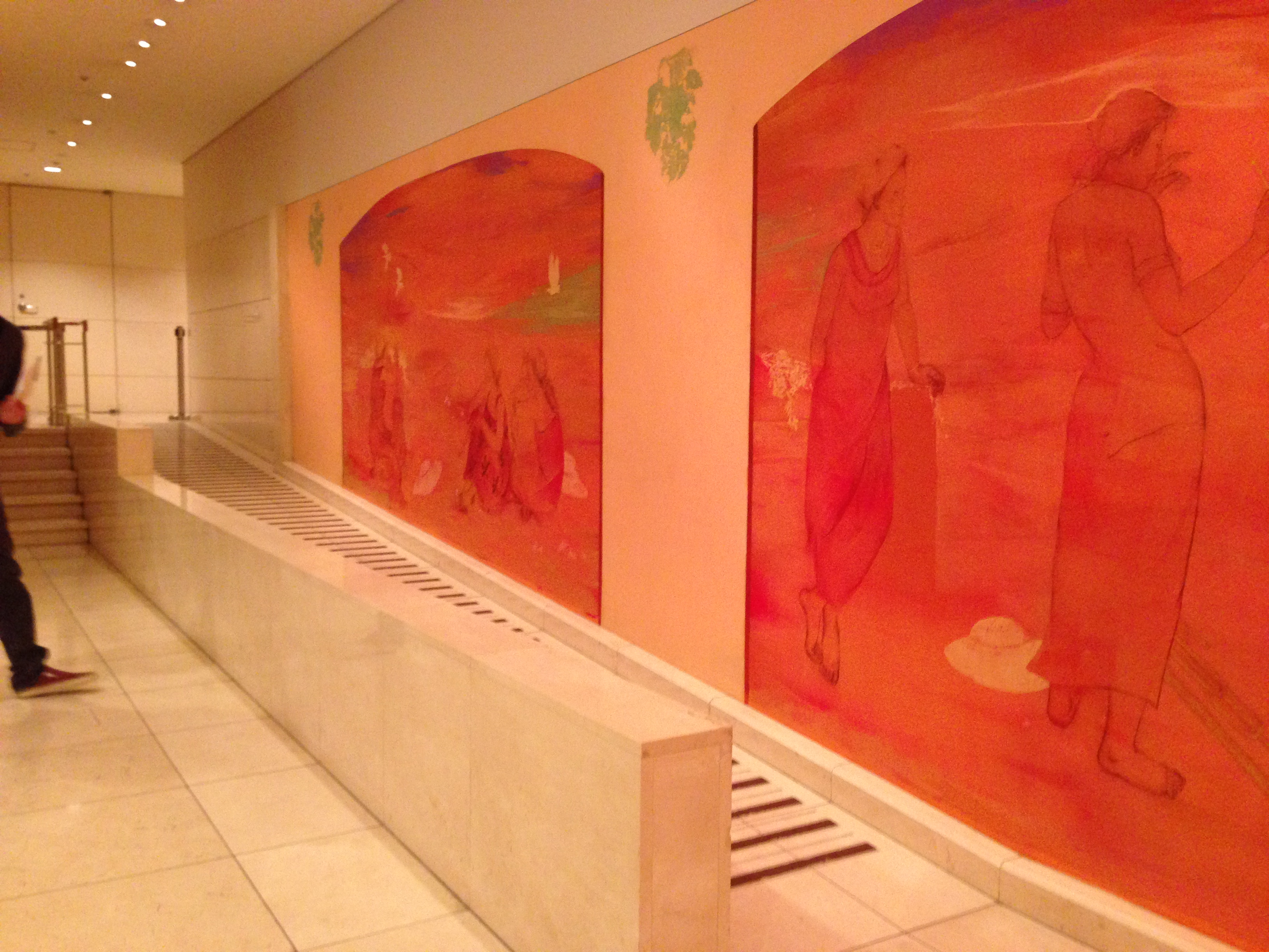 ホワイエにある田村能里子の壁画「季の風奏」。 車椅子用のスロープ付近では、車椅子の目線で描かれている